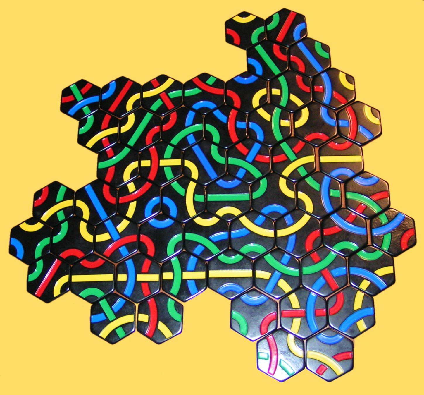 Endstand eines Mehrspieler-Tantrix